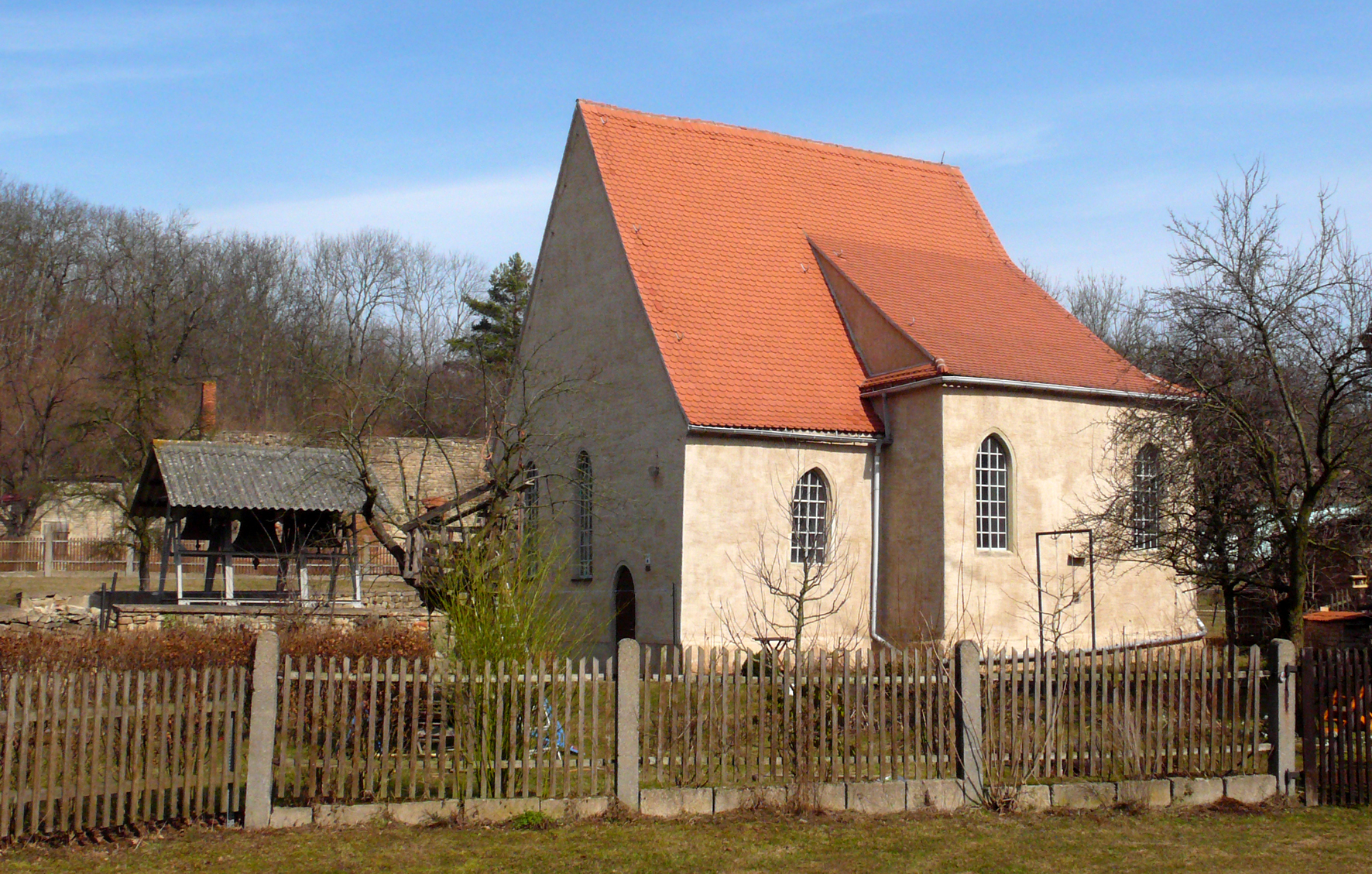 Dehlitz (Saale), Kirche.